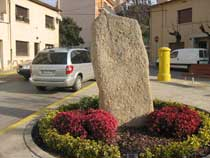 Fotografía de la Piedra Larga de Palau-solità i Plegamans.